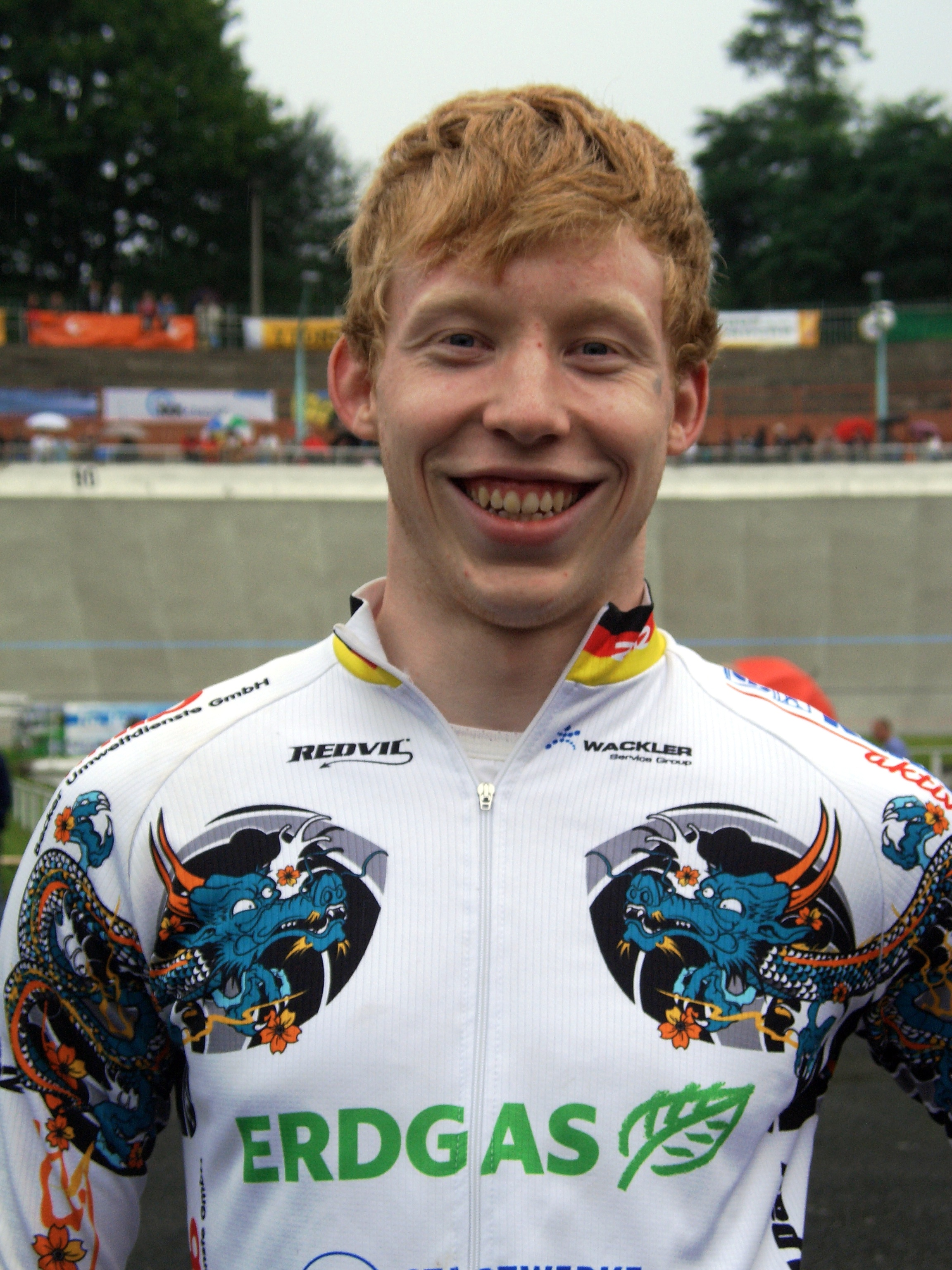 Joachim Eilers, deutscher Radrennfahrer